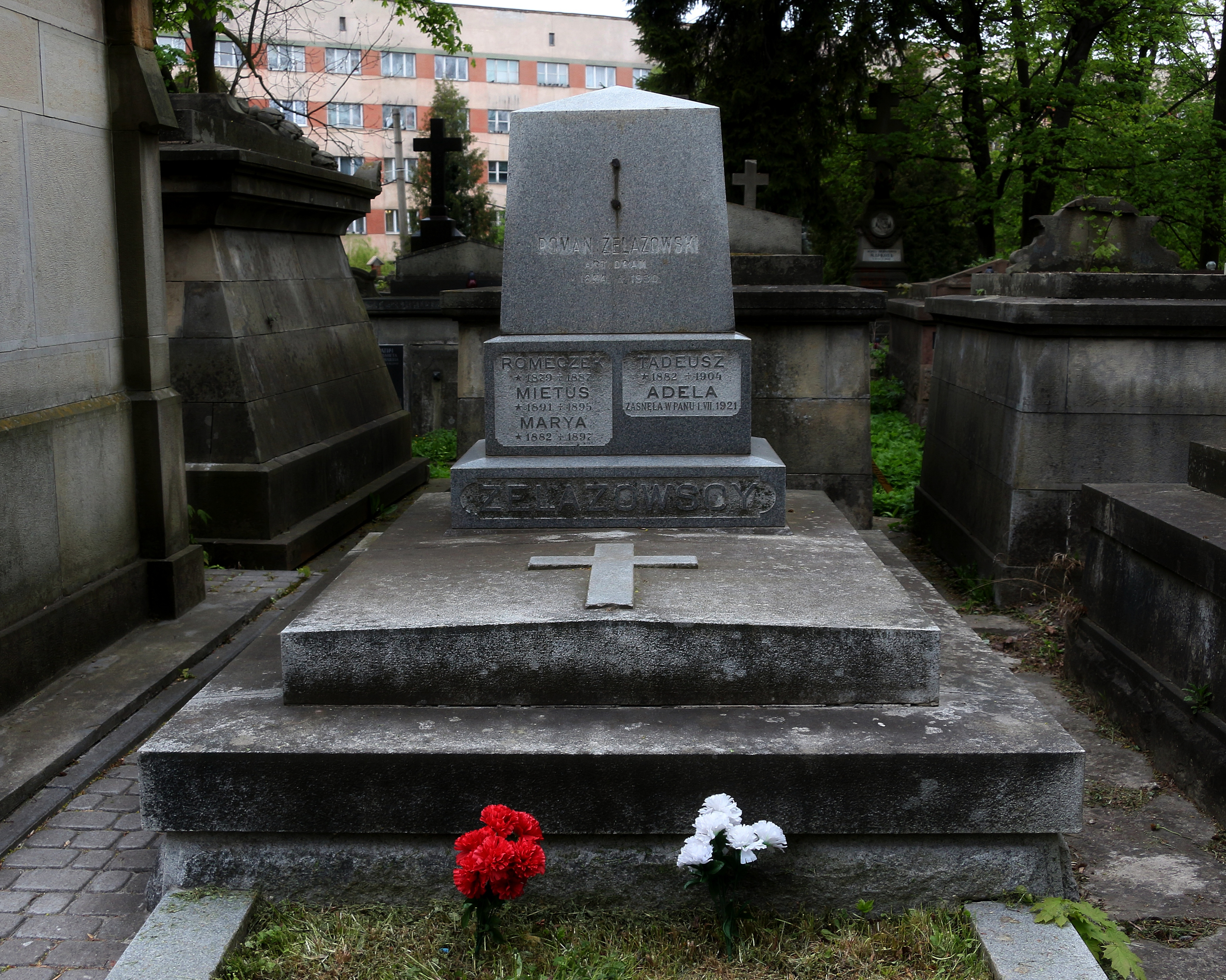 Гробниця родини Зелязовських. Личаківський цвинтар , поле 1а.